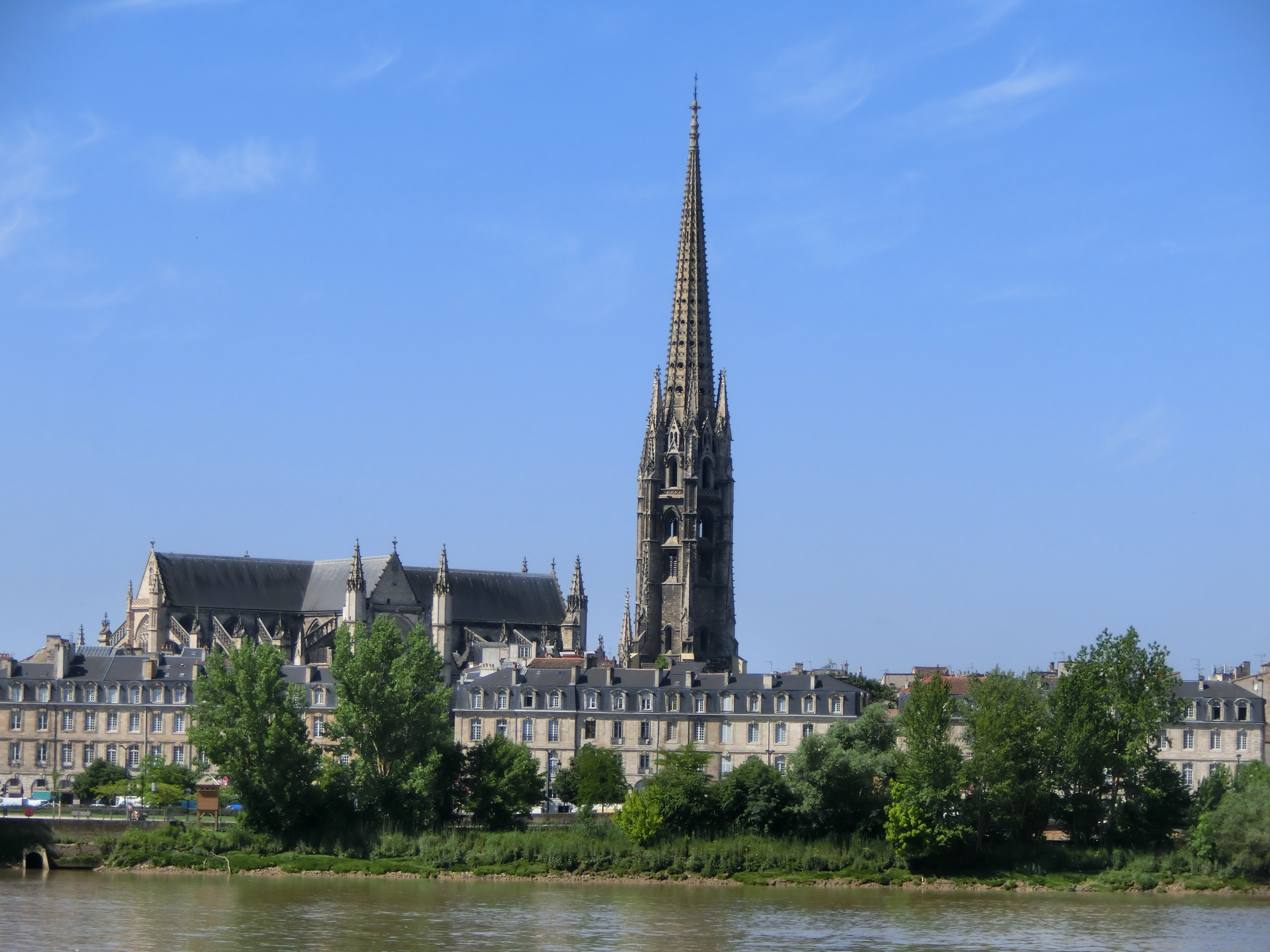 Basilique Saint-Michel de Bordeaux vue de la rive opposée.